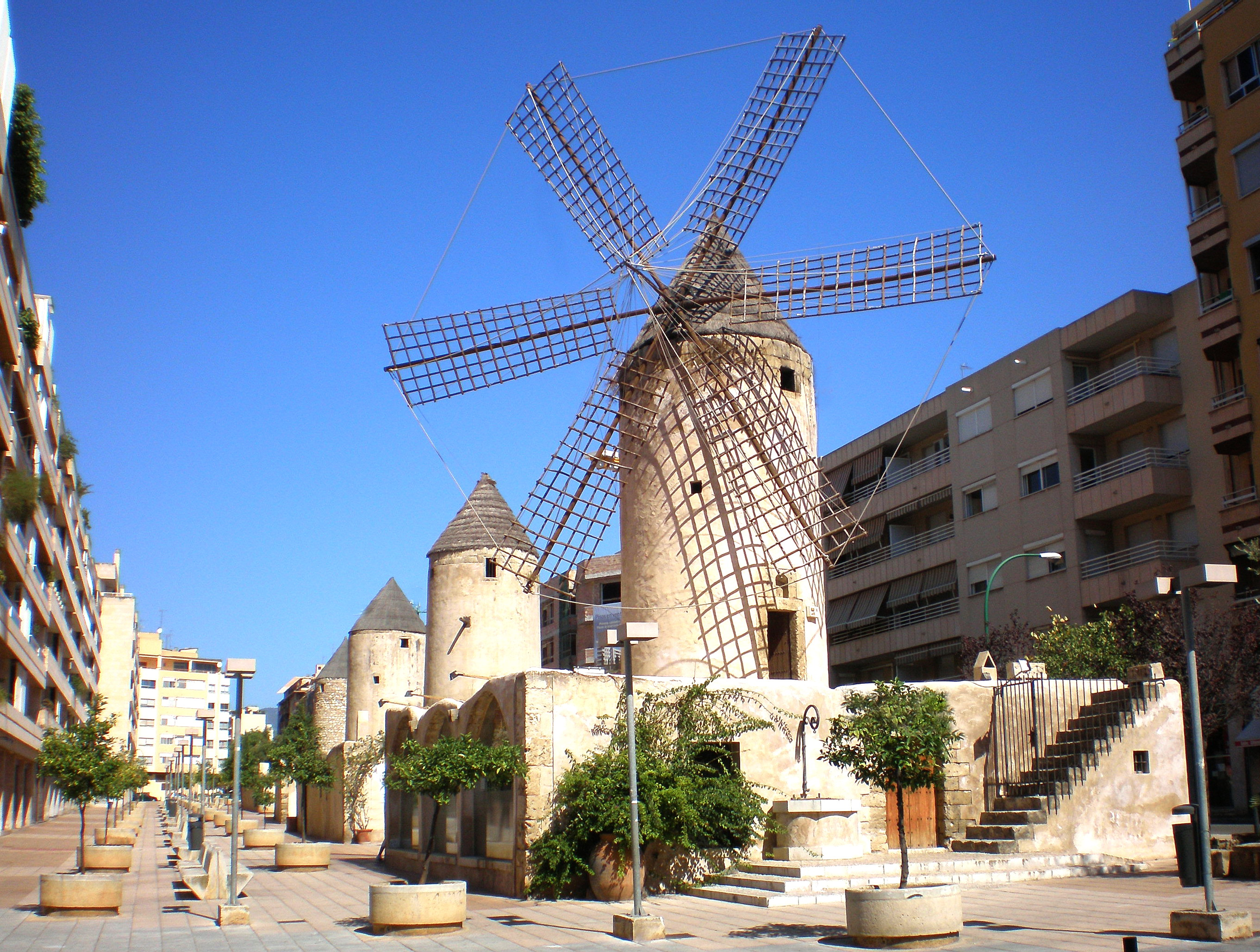 Palma de Mallorca - Antiguos molinos de viento en el centro de la ciudad